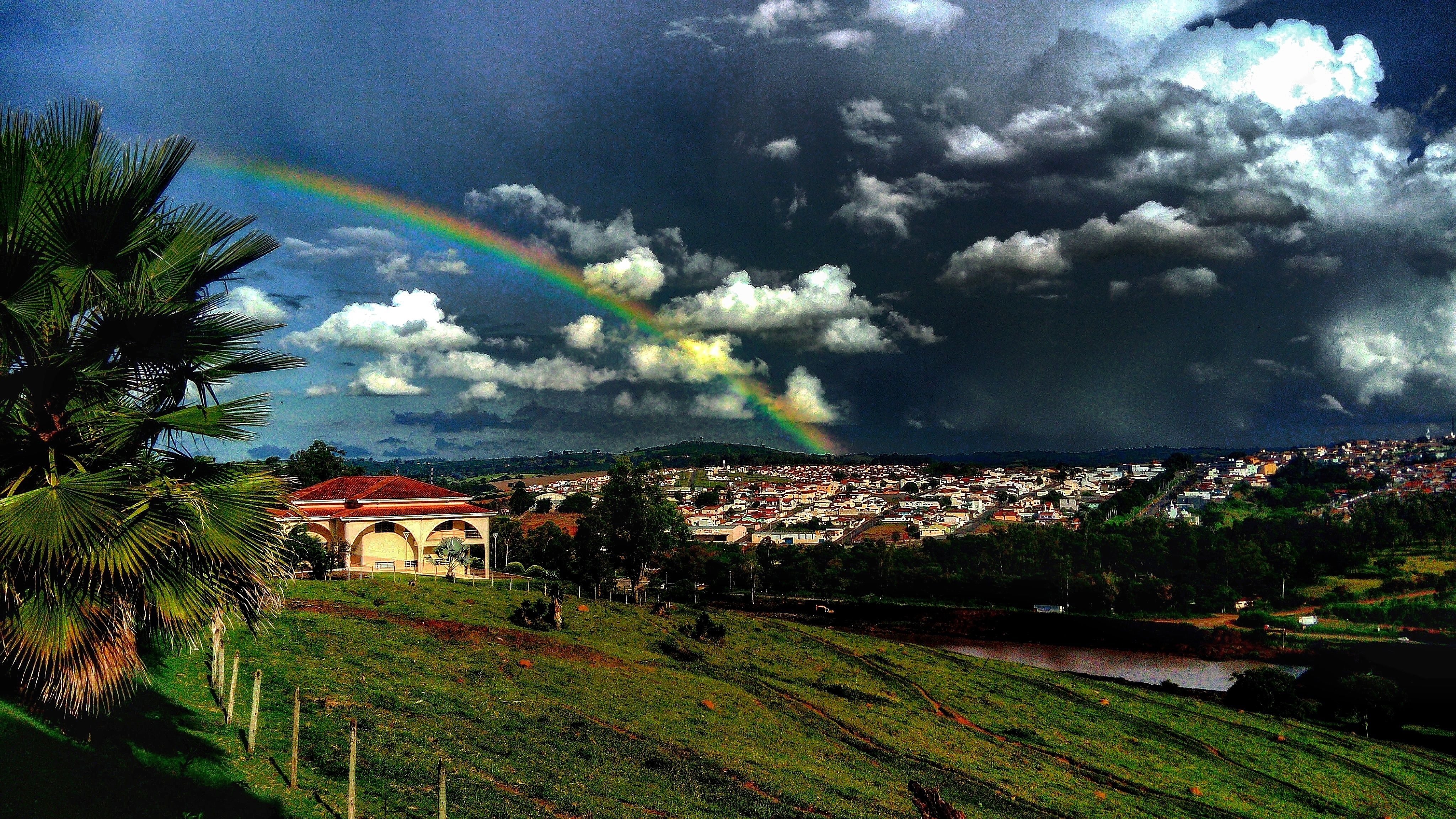 Tempestade seguida de um arco-íris no município de Muzambinho, sul do Estado de Minas Gerais. A foto foi tirada no Câmpus do Instituto Federal do Sul de Minas Gerais Campus Muzambinho.